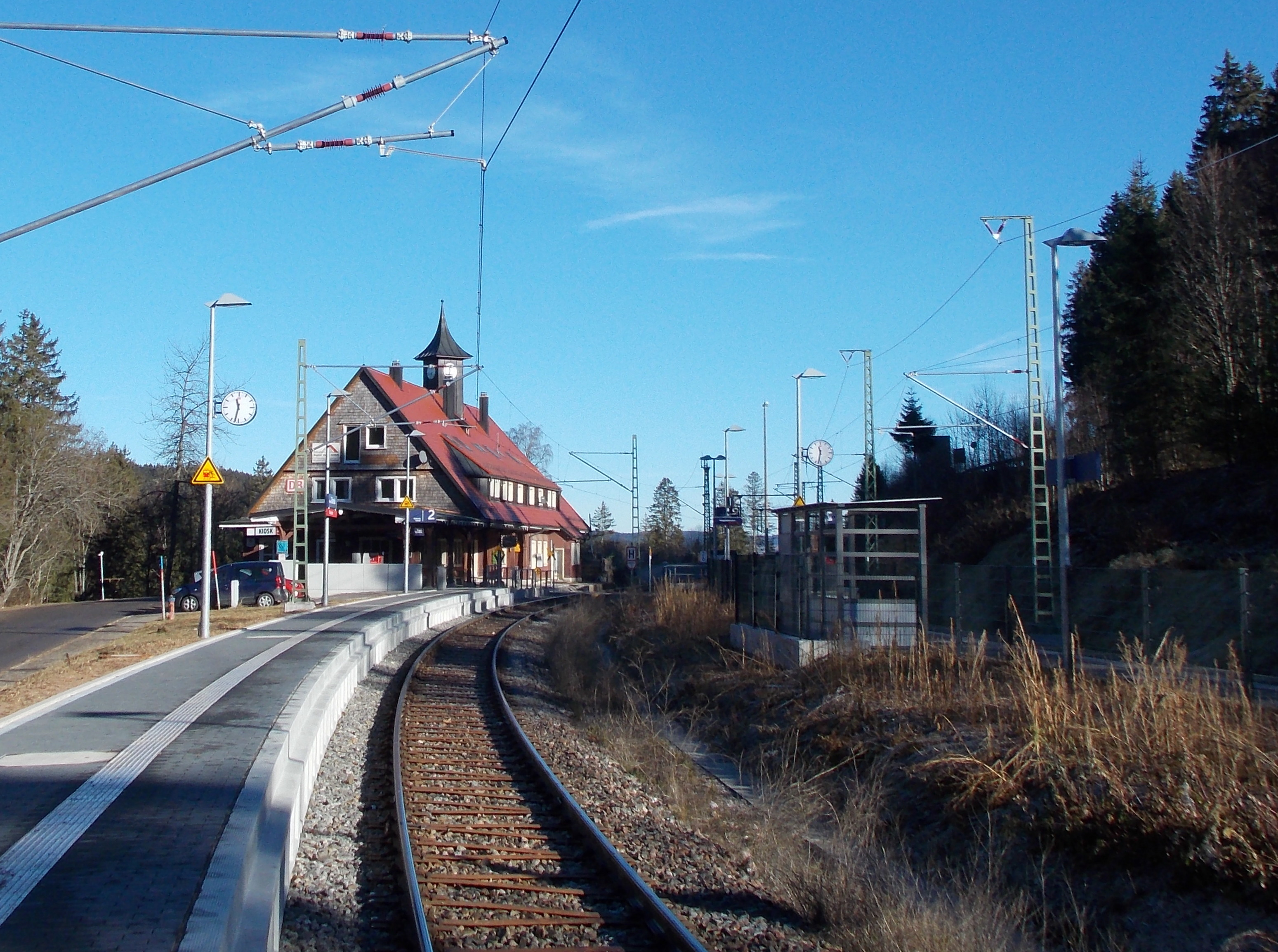 Der im Frühjahr 2016 erneuerte Bahnsteig des Bahnhofs Feldberg-Bärental